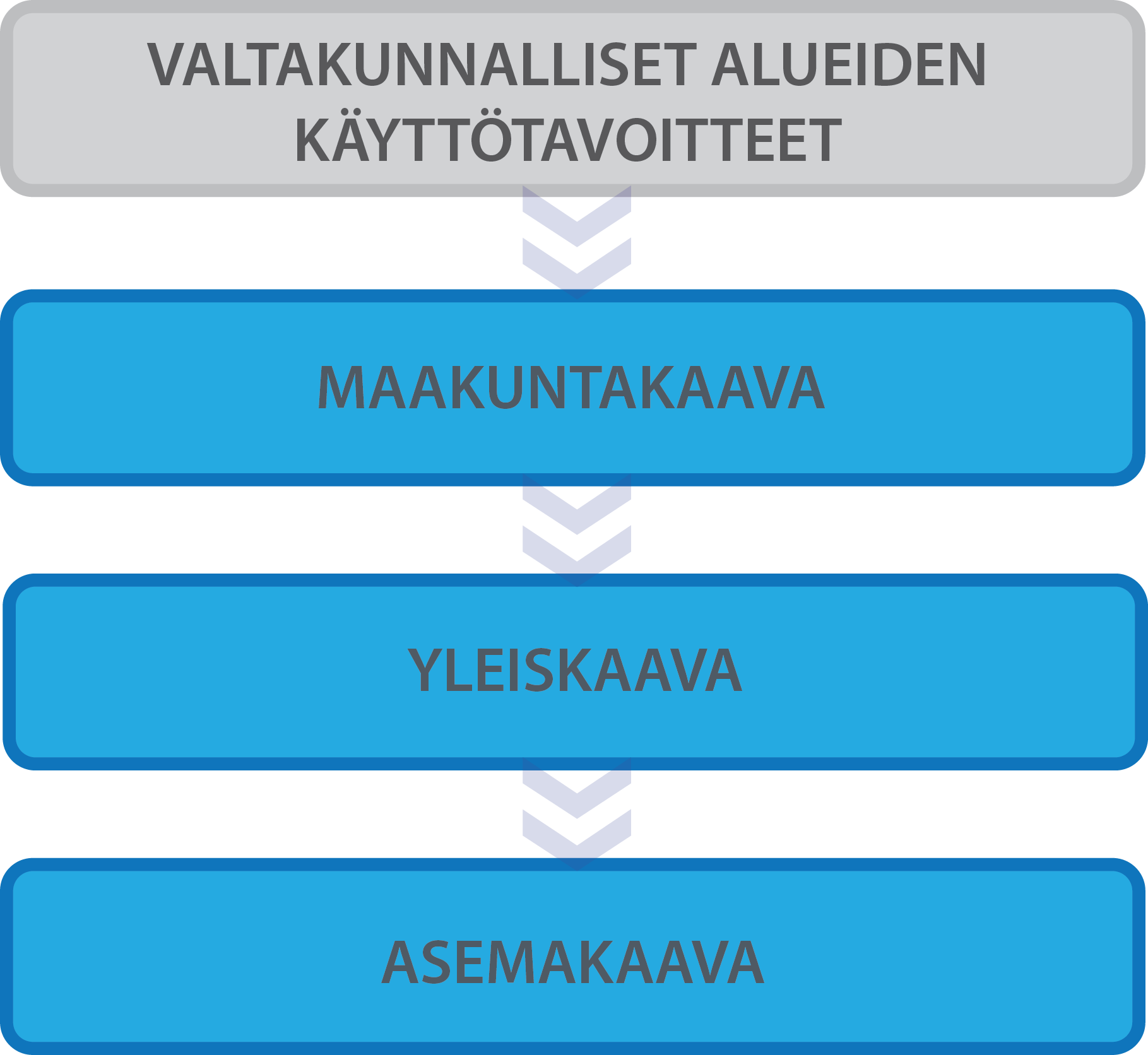 Kuva havainnollistaa Suomessa sovellettavaa kaavahierarkiaa. Ylimmän tasolla ovat valtakunnalliset alueiden käyttötavoitteet. Maakuntakaava taas ohjaa kunnan yleiskaavoitusta ja yleiskaavoitus taas asemakaavoitusta.